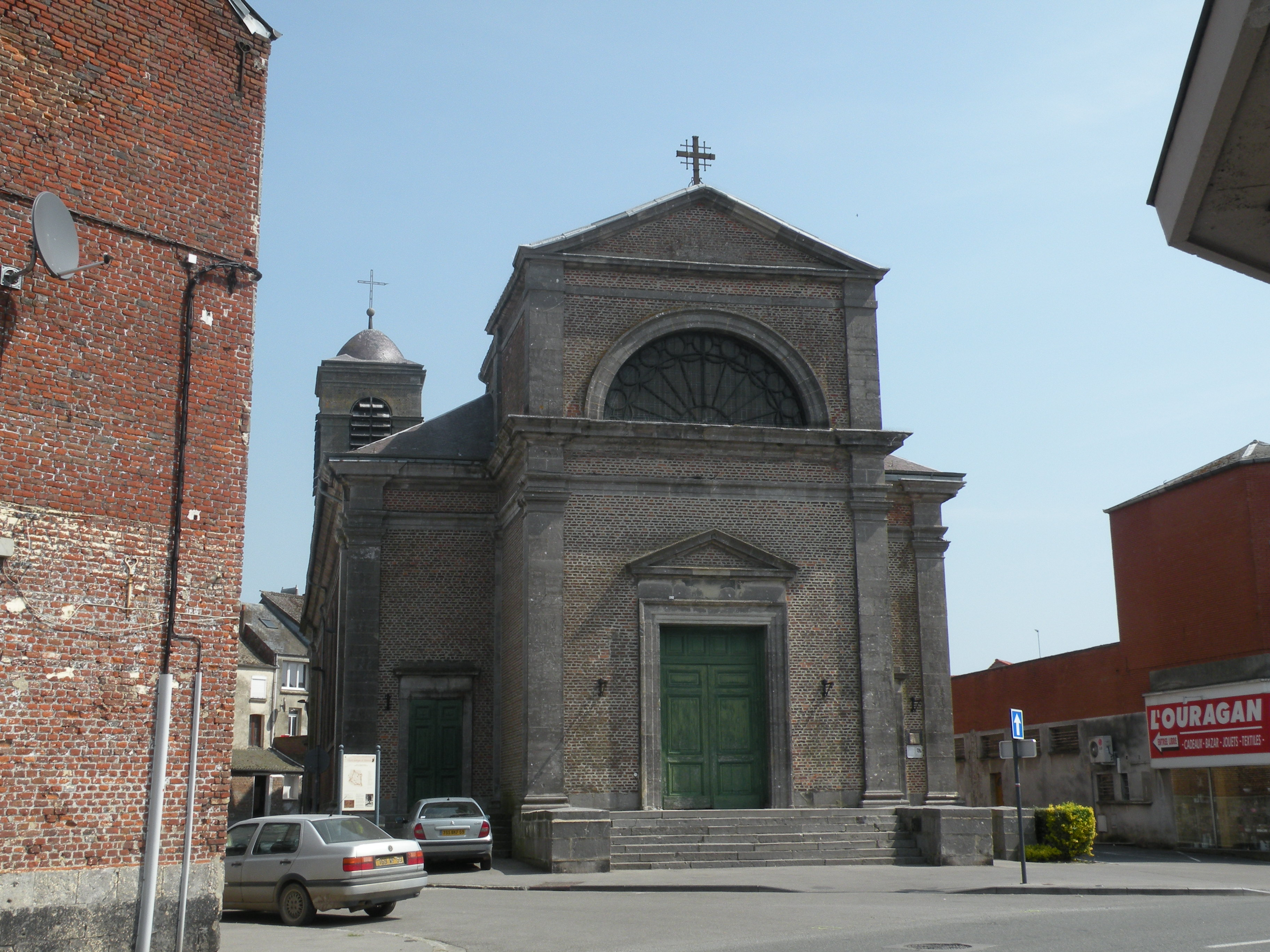 Église Saints-Pierre-et-Paul de Landrecies